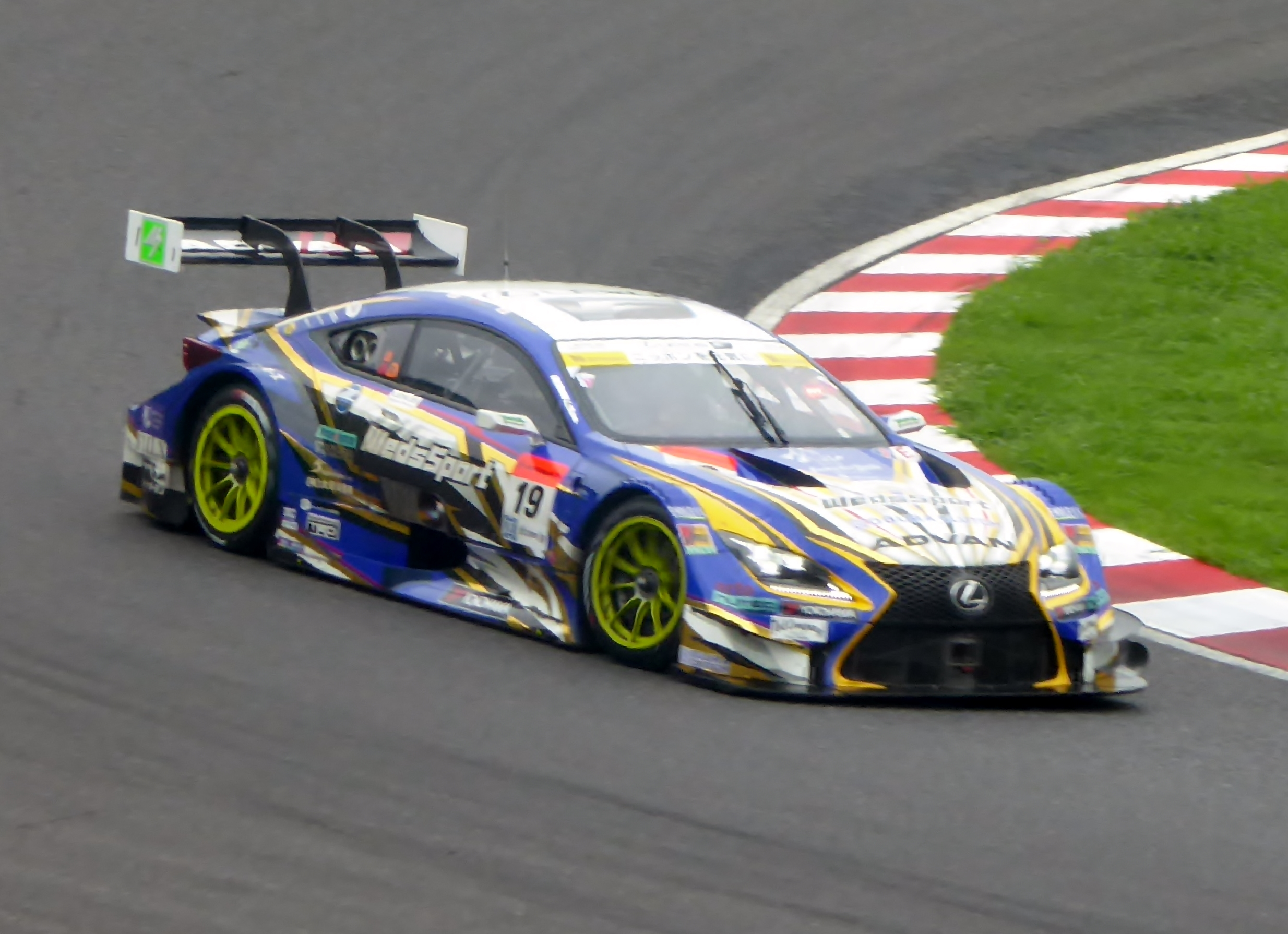 2015年鈴鹿1000㎞において19号車WedsSport ADVAN RC Fを撮影。